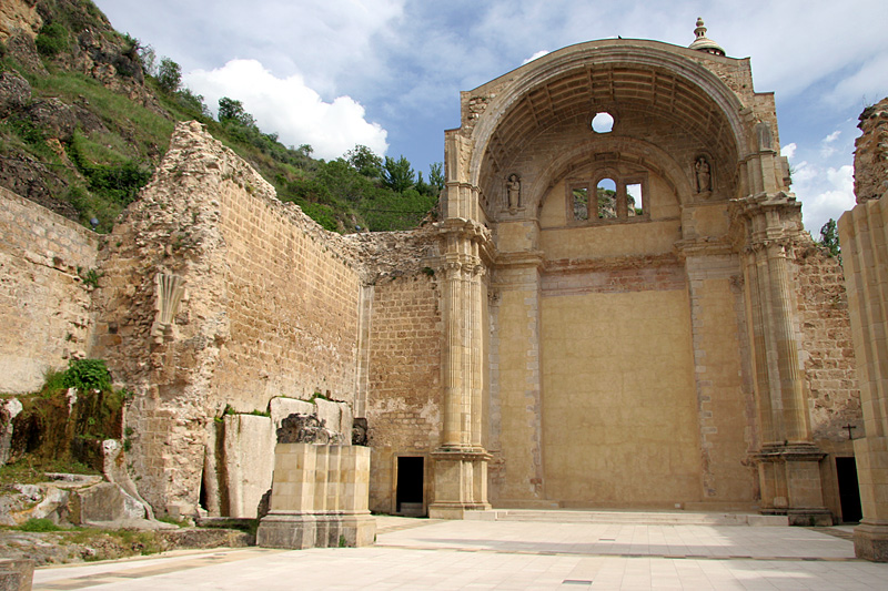 Iglesia de Santa Maria en Cazorla, Jaen.